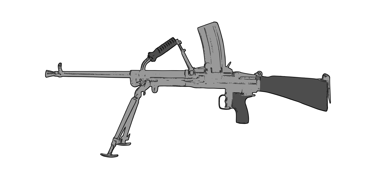 Lehký Kulomet vzor 52 (Czech: light machine gun model 52)